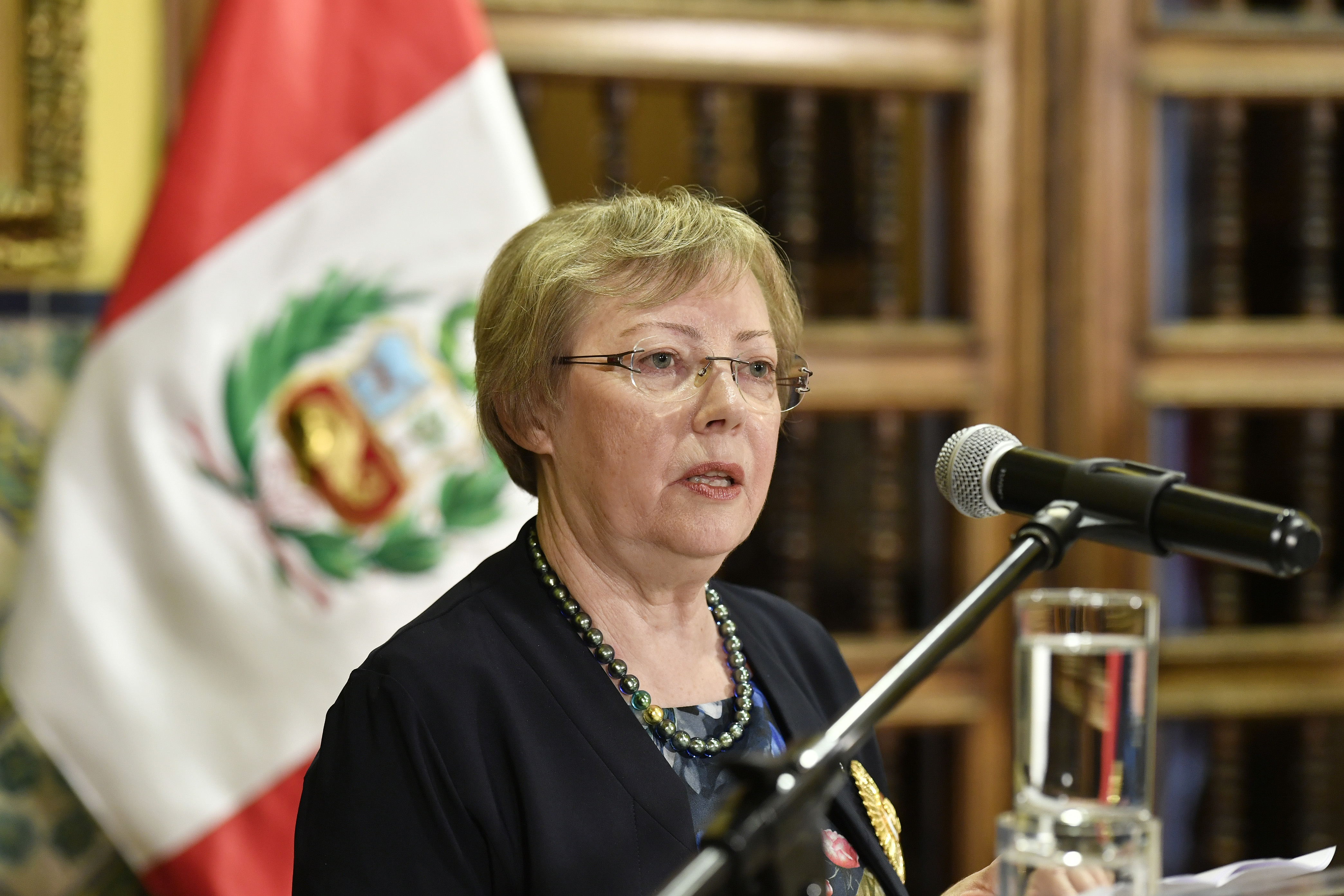 El canciller Nestor Popolizio impuso la condecoración de la Orden al Mérito por Servicios Distinguidos, en el Grado de “Gran Oficial”, a la Dra. Juliane Koepcke, en reconocimiento a su labor científica y académica enfocada en la Amazonía peruana.